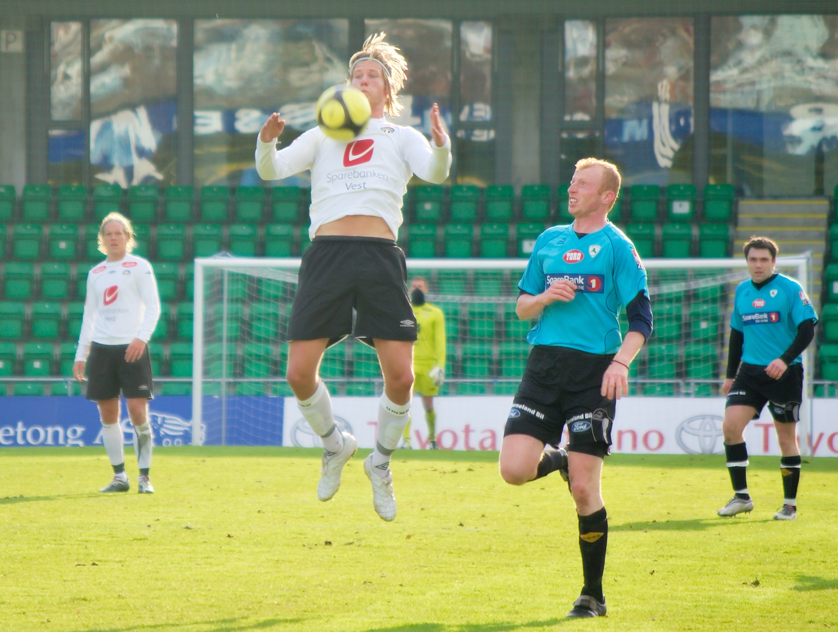 Ulrik Flo